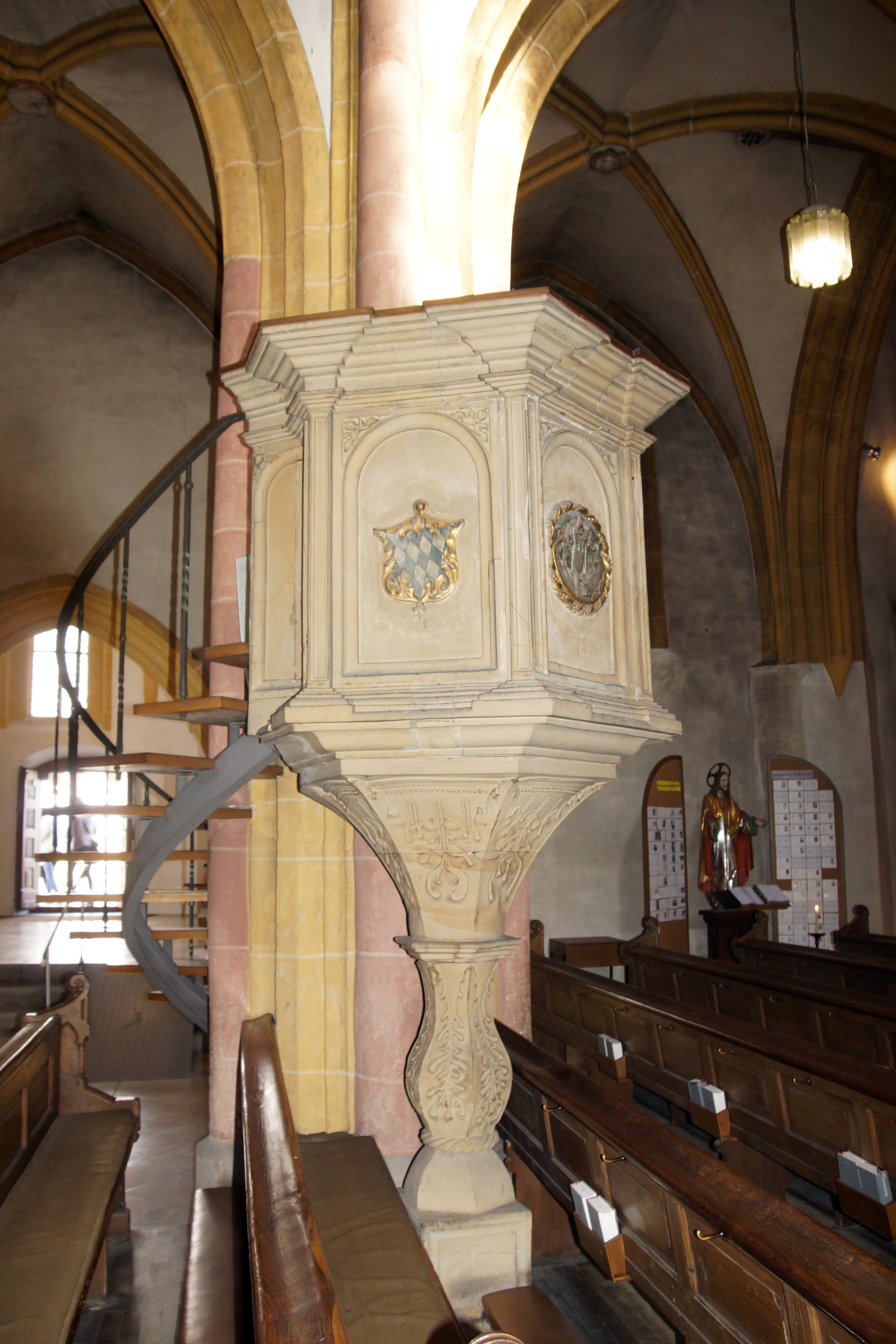 Die Pfarrkirche St. Johann Baptist in Nabburg